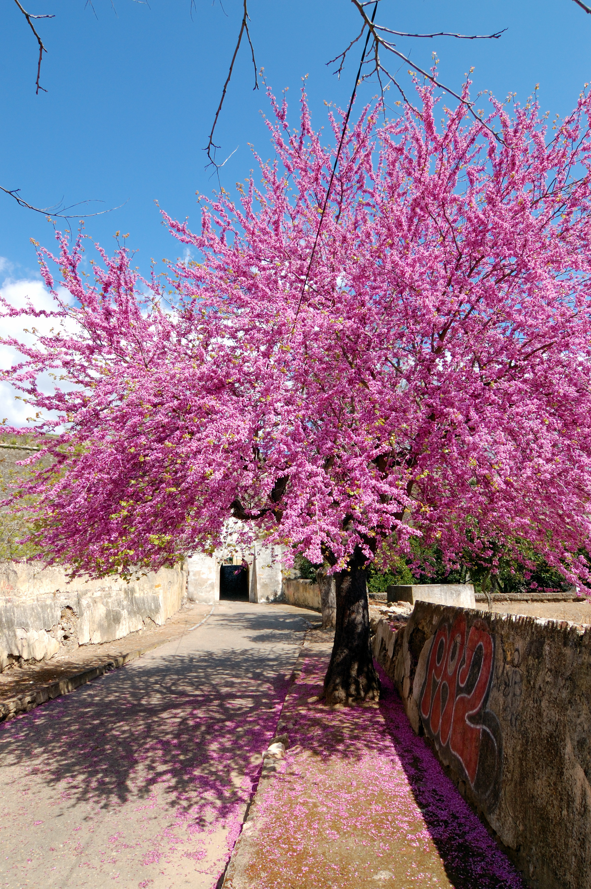 Elvas, Portugal [2007]